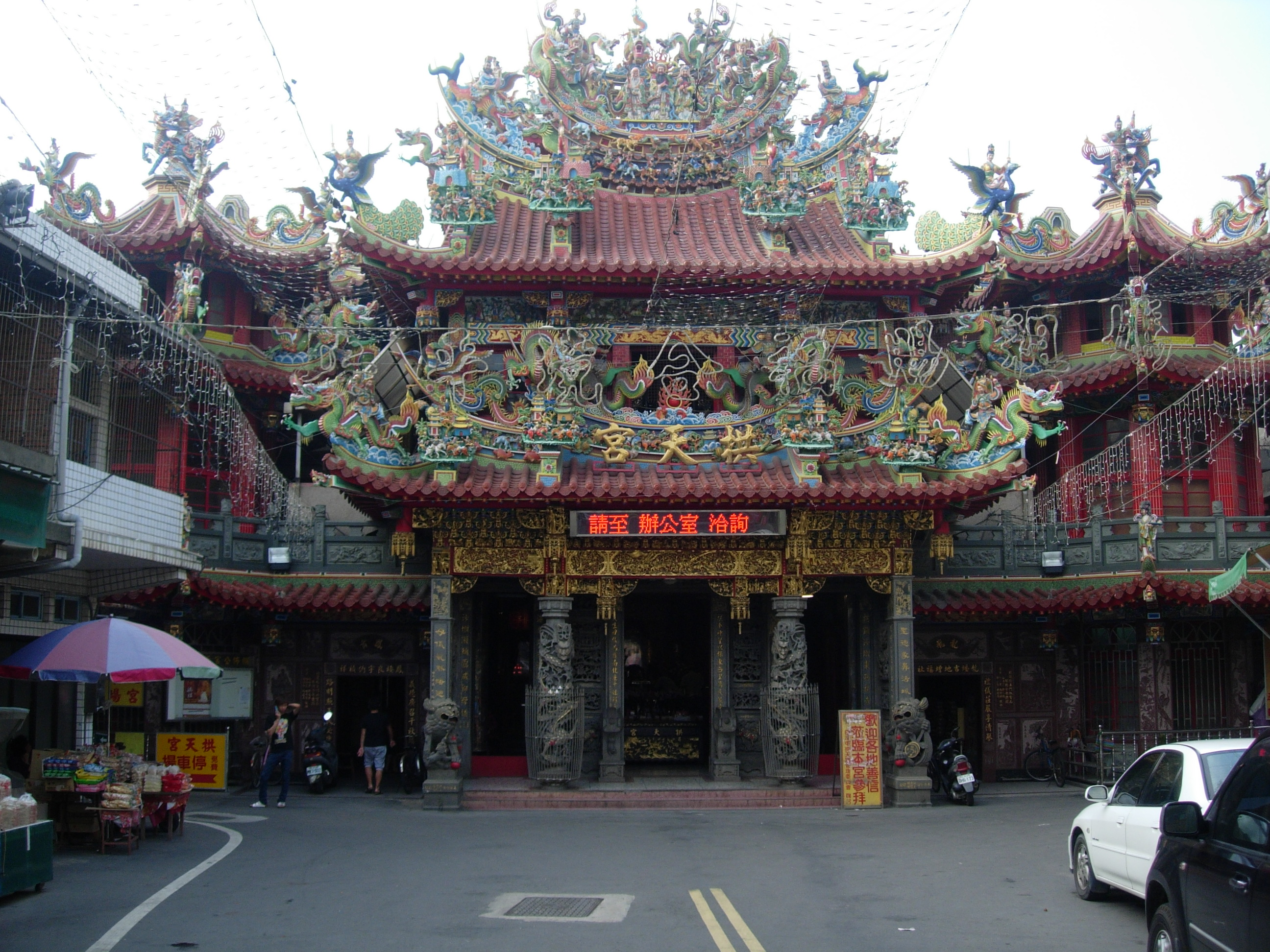 中文（台灣）: 白沙屯拱天宮。